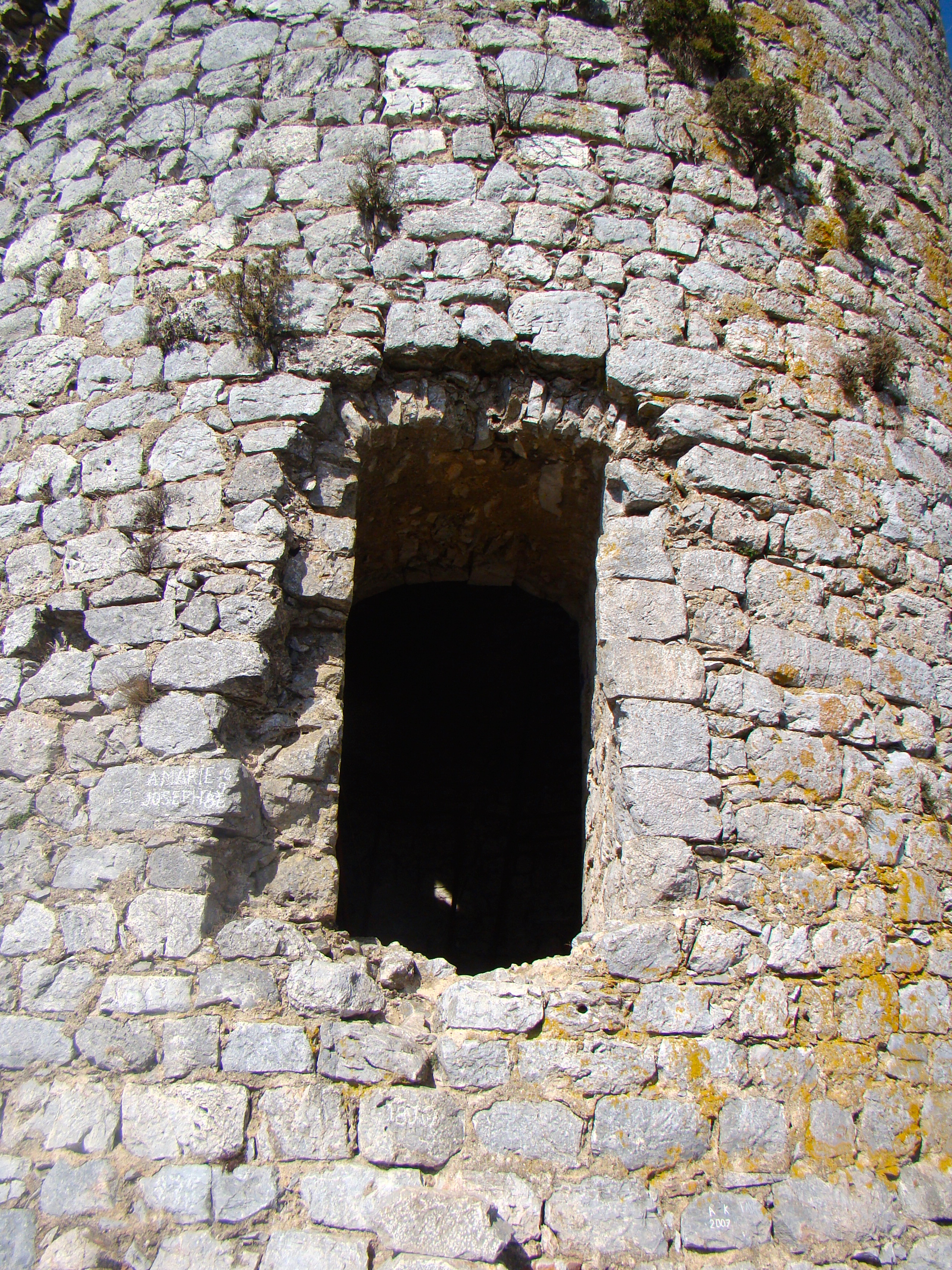 Portail d'entrée de la tour del Far